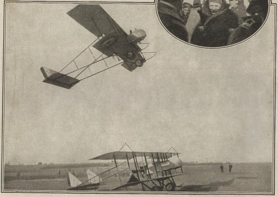 Deux Farman MF11 s'envolant de Boudros vers Lemnos, front de Macédoine en mars 1916. Le général Bauman en médaillon.